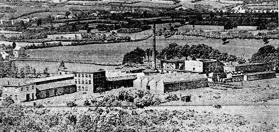 Tuchfabrik Mayer im Wesertal in Eupen-Unterstadt vor 1900